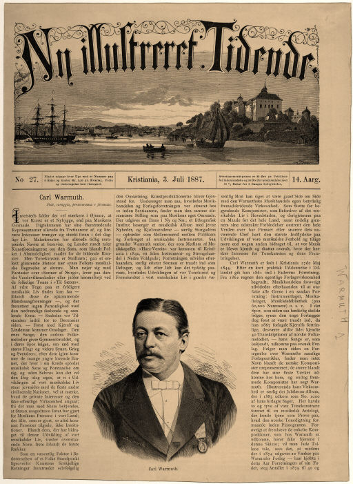 Forsiden av Ny illustreret tidende 3. juli 1887, med et portrett av Carl Warmuth av H. C. Olsen (1845–1909).